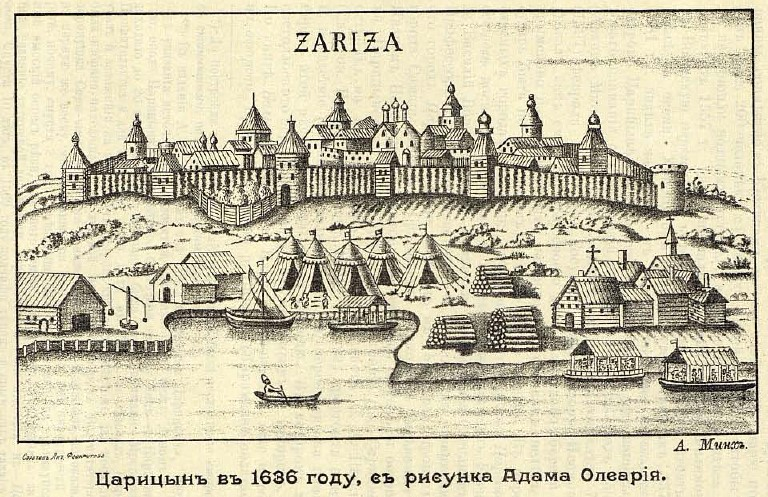 Гравюра с видом Царицына в 1623 году.